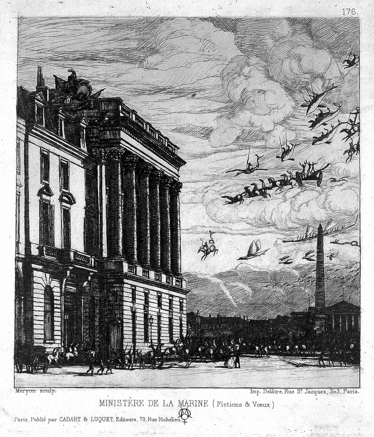 'Ministere de la Marine (Fictions & Voeux). Iconographic Collections Keywords: Charles Méryon